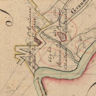 El Castell de Serola i l'església de Sant Pere en el Cadastre napoleònic del 1812 (Arxius Departamentals dels Pirineus Orientals)